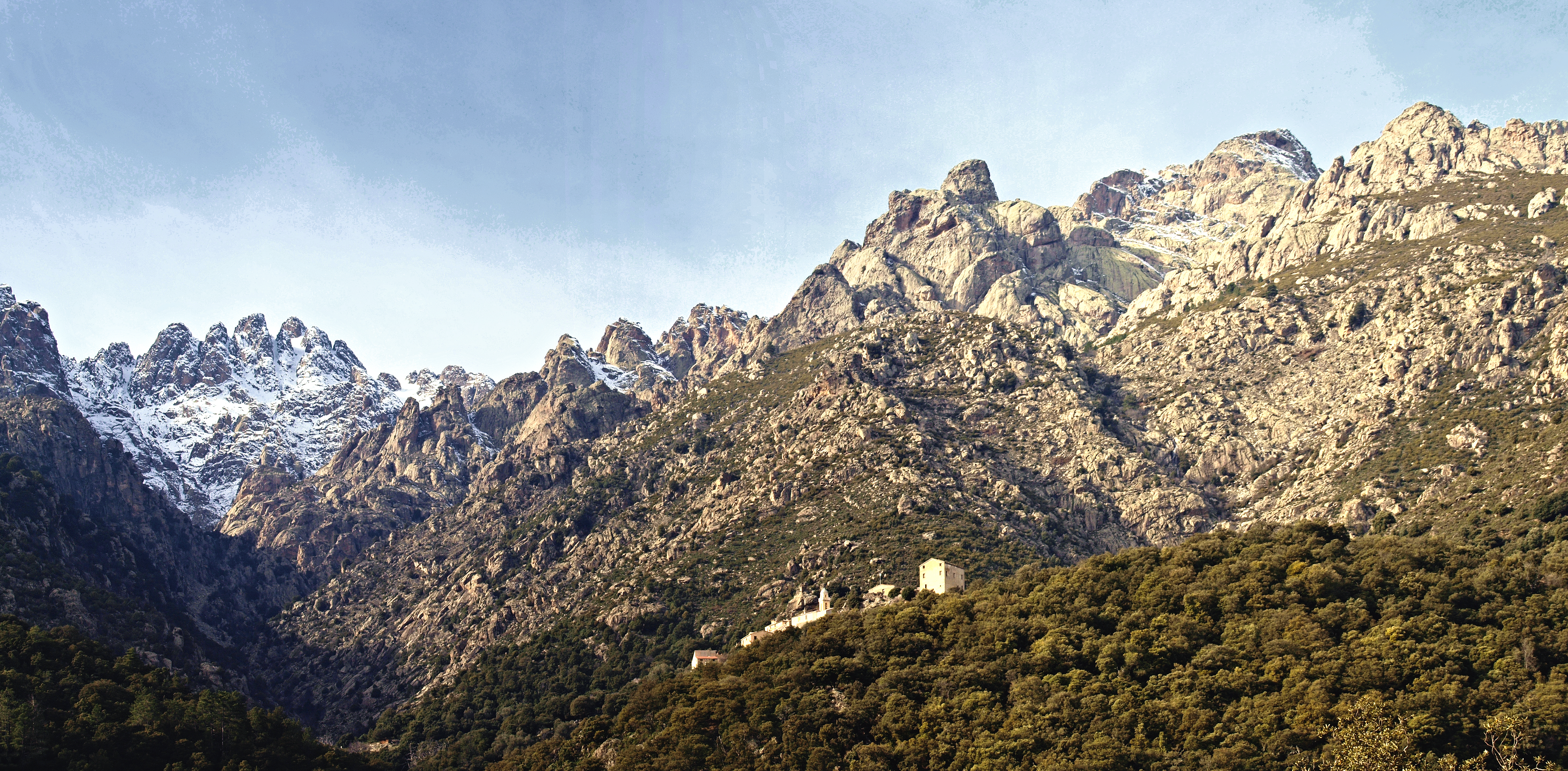 Castiglione (Corsica) - Panorama sur les Aiguilles de Popolasca